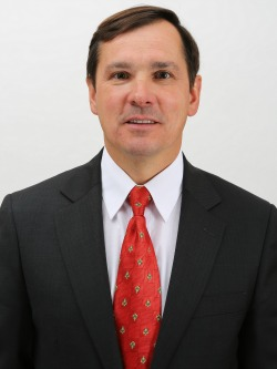 Jorge Rathgeb Schifferli